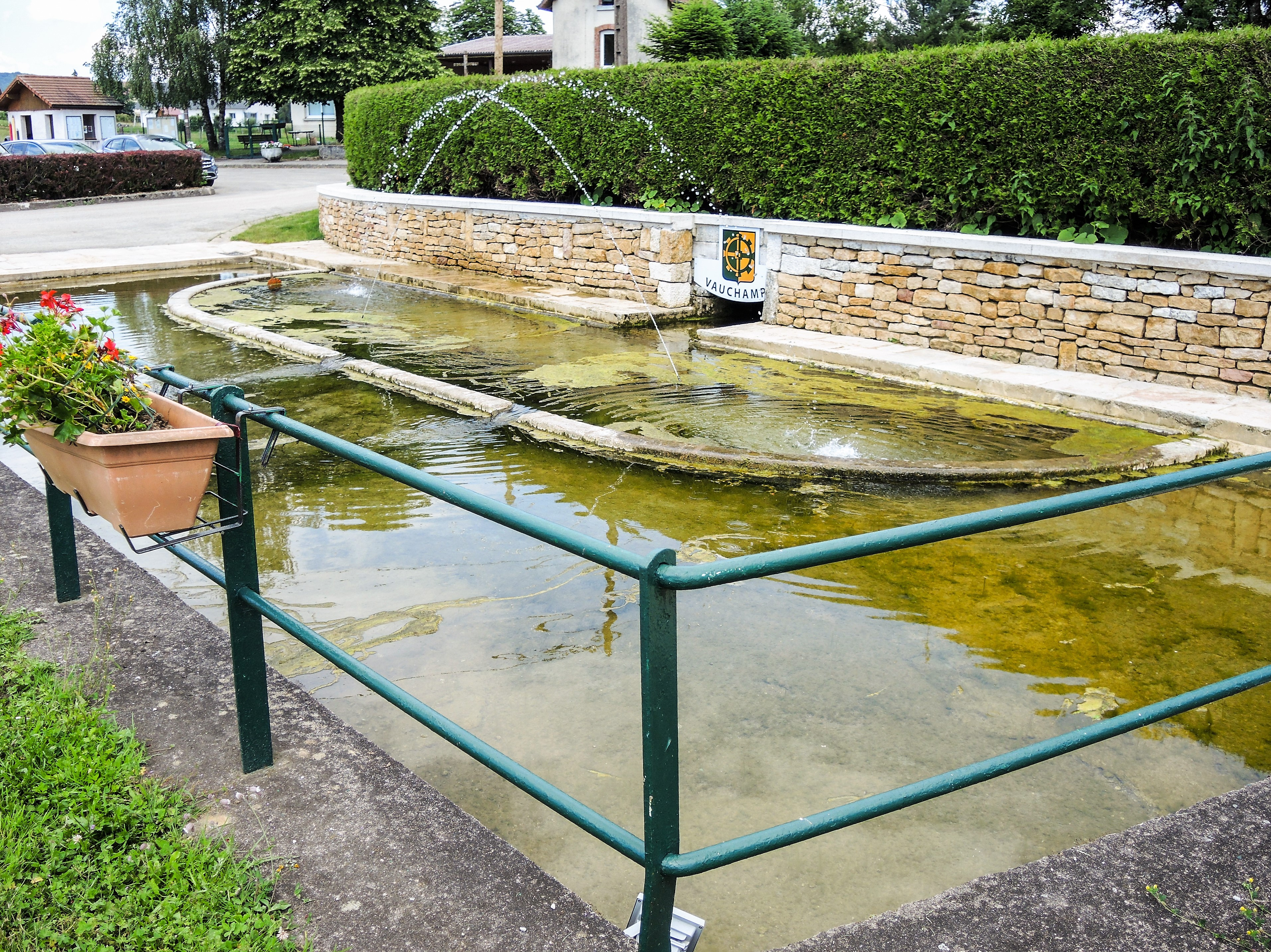 Fontaine-lavoir, au centre du village de Vauchamps. Doubs